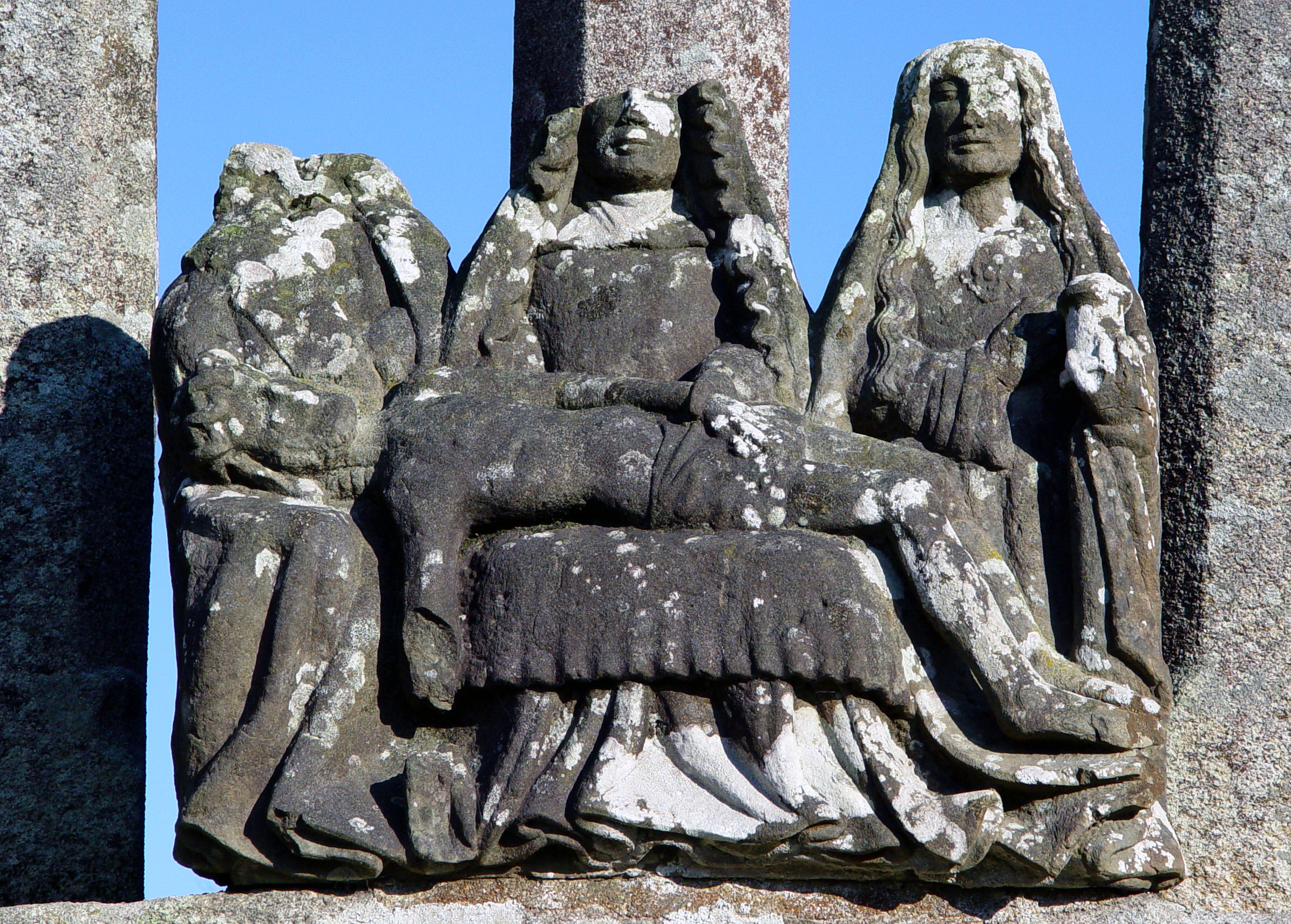 Saint-Hernin (Bretagne, Finistère) Calvaire: Pieta, stark beschädigt. Zur Rechten Mariens Johannes zur Linken Maria Magdalena.